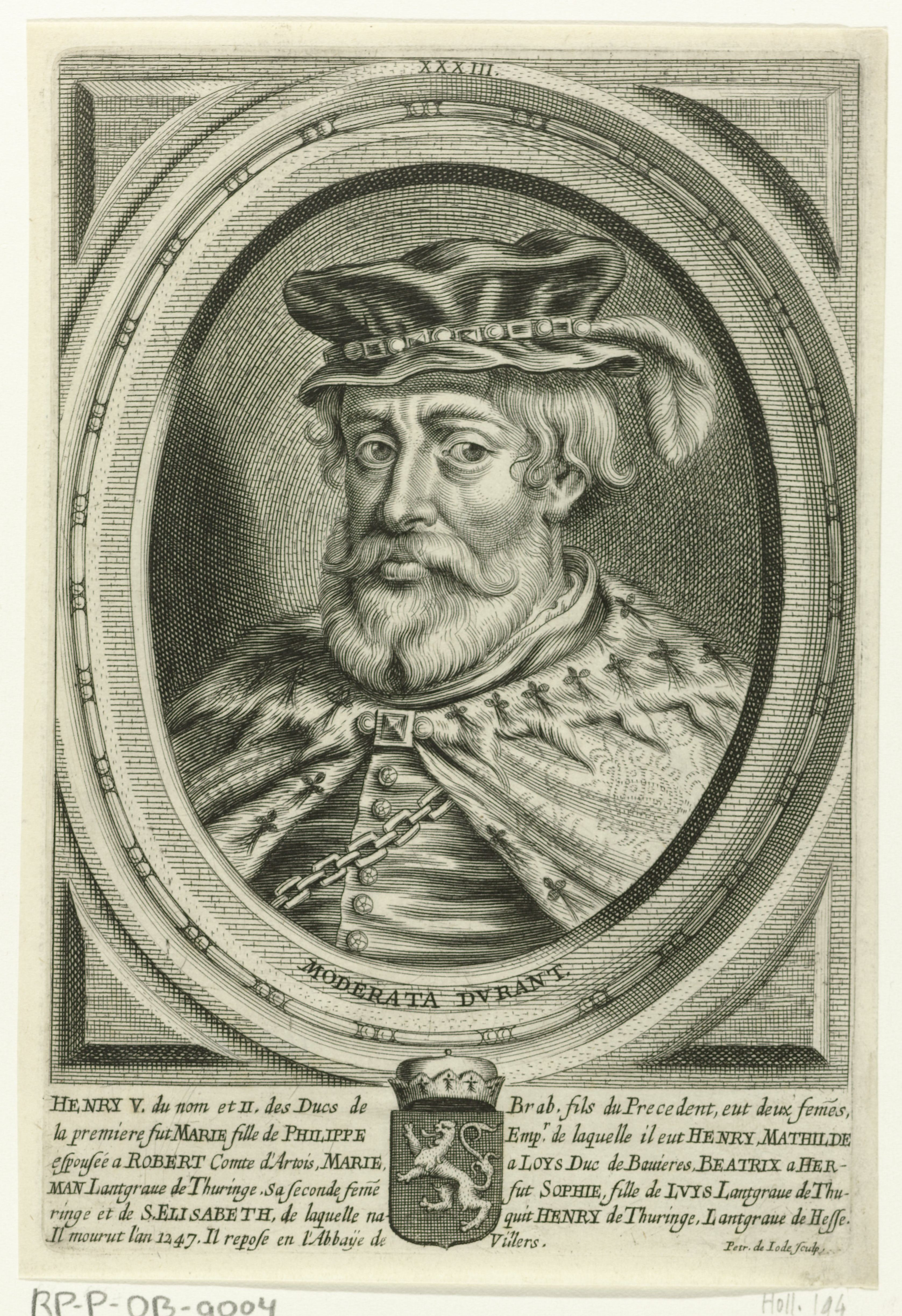 IdentificatieTitel(s): Portret van Hendrik V, hertog van BrabantObjecttype: prent boekillustratie Objectnummer: RP-P-OB-9004Catalogusreferentie: Hollstein Dutch 181-204Hollstein Dutch 105-158Opschriften / Merken: verzamelaarsmerk, verso, gestempeld: Lugt 2228Omschrijving: Busteportret van Hendrik V, met gevederde hoed. Het portret is gevat in een ovale omlijsting met vierkant randwerk en een motto in het Latijn. In de marge het wapenschild van de geportretteerde en een zesregelig onderschrift in het Frans. Prent uit een boek Waar: in 54 prenten met portretten.VervaardigingVervaardiger: prentmaker: Pieter de Jode (II) (vermeld op object)uitgever: Joannes MeyssensPlaats vervaardiging: AntwerpenDatering: na 1661 - 1663Fysieke kenmerken: ets en gravureMateriaal: papier Techniek: etsen / graveren (drukprocedé)Afmetingen: plaatrand: h 175 mm × b 117 mmToelichtingPrent uit: Joannes Meyssens, Les effigies des souverains princes et ducs de Brabant avec leur chronologie, armes et devises. Antwerpen: Joannes Meyssens, na 1661.OnderwerpWie: Hendrik V (hertog van Brabant)Verwerving en rechtenVerwerving: onbekendCopyright: Publiek domein